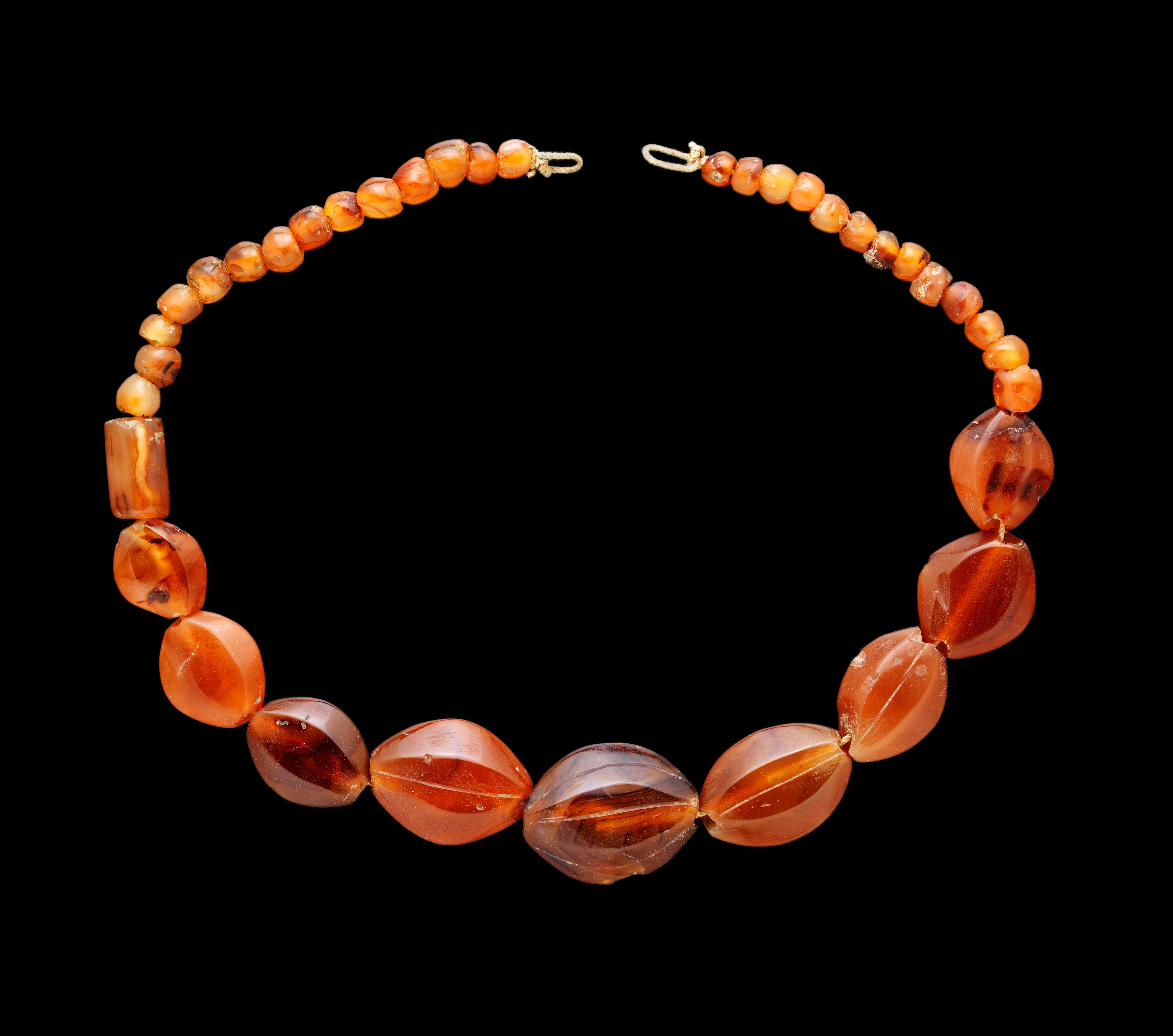 Halskæde, Kattavia Carneleon*halskæde af 37perler- måler fra 0,5-2,5cm 27 små spheriske perler, en cylinderformet, ni amygdaloid facetteret hvor fire har horizontal indgraveret linier Mykensk periode sic: Karneol giver mere mening